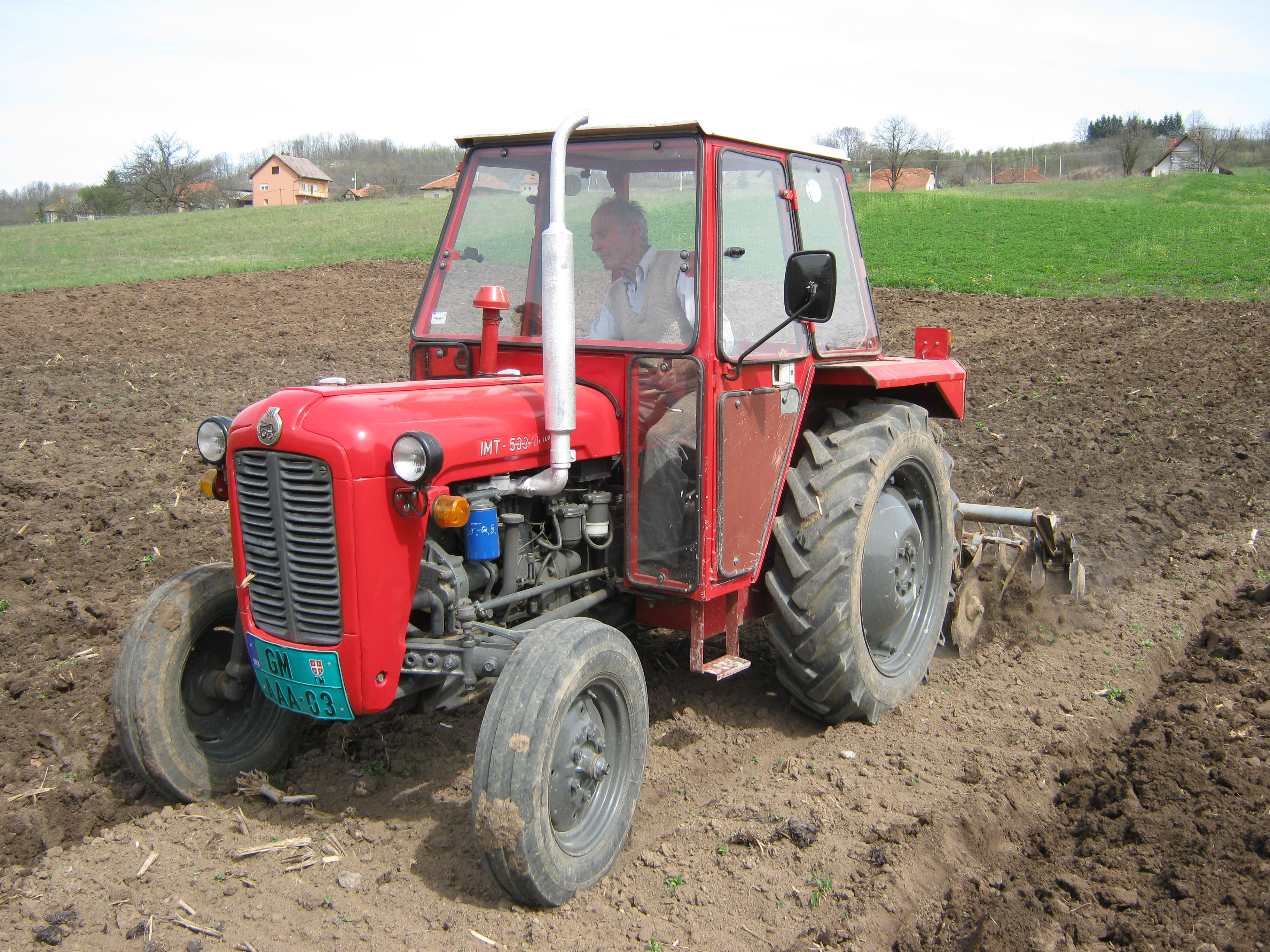 IMT 533 DeLuxe. Tanjiranje. Godina proizvodnje 1973. Šarani, Gornji Milanovac.